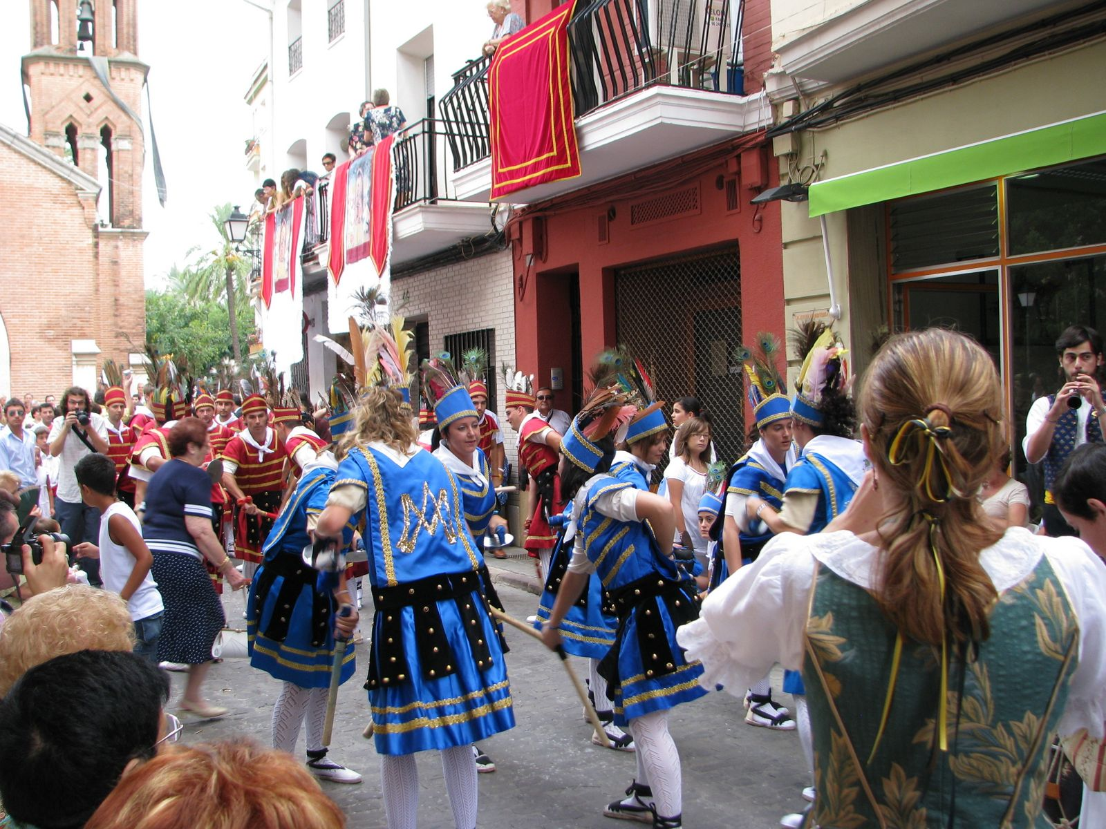 Procesión de Nuestra Señora de la Salud de Algemesí.